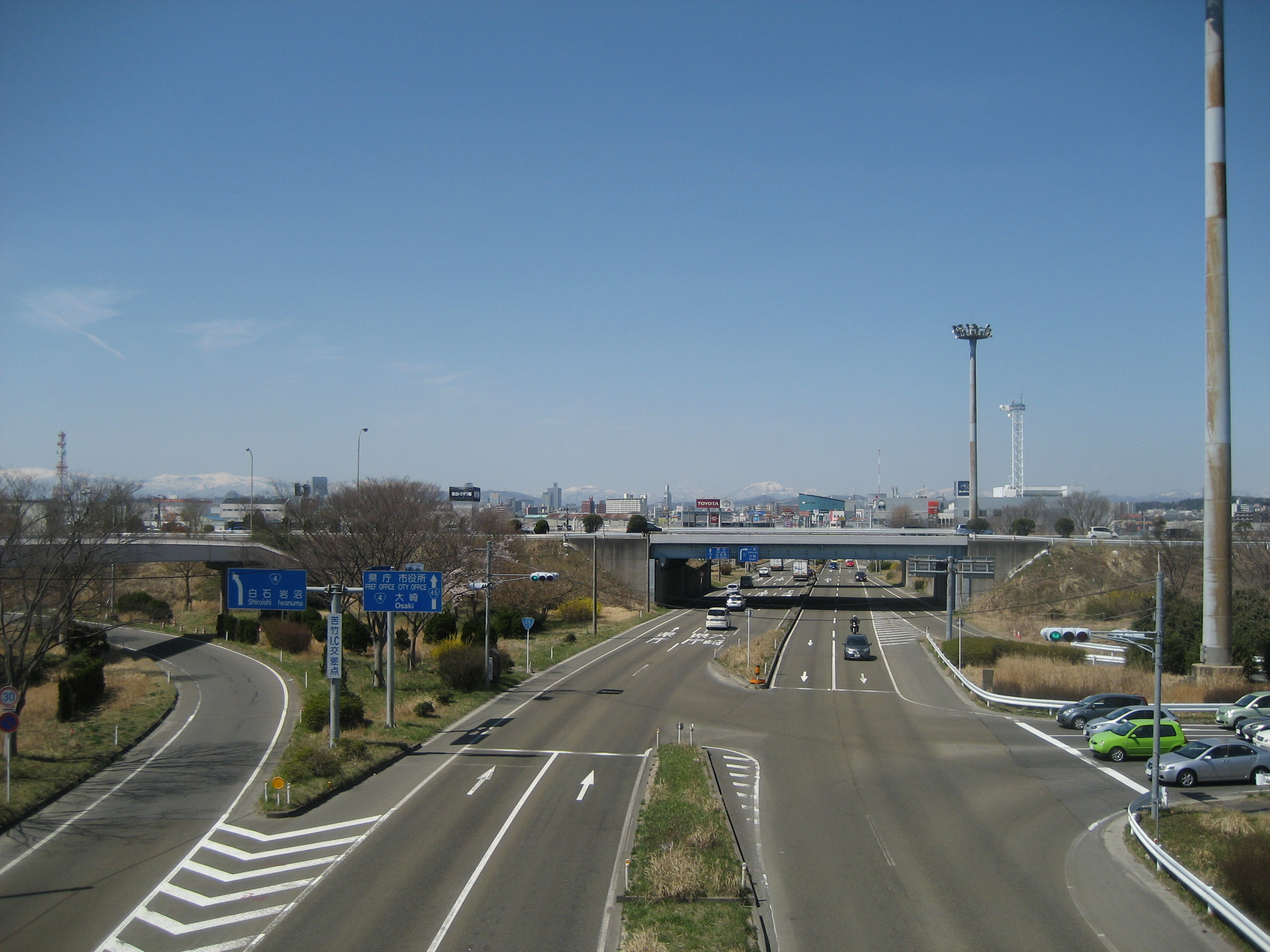 国道45号線苦竹IC交差点付近（仙台市中心部方面を撮影）